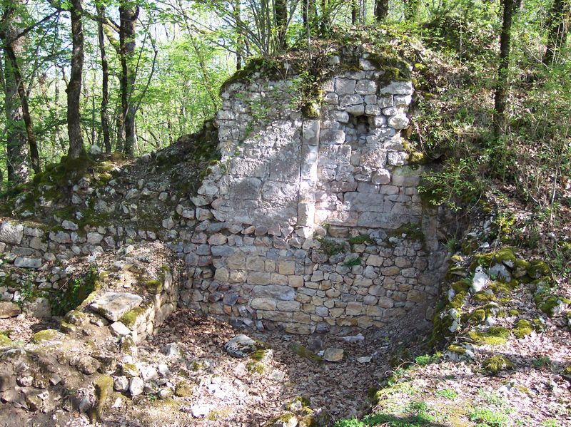 Photo du château d'Auberoche : le logis seigneurial. Photo personnelle.